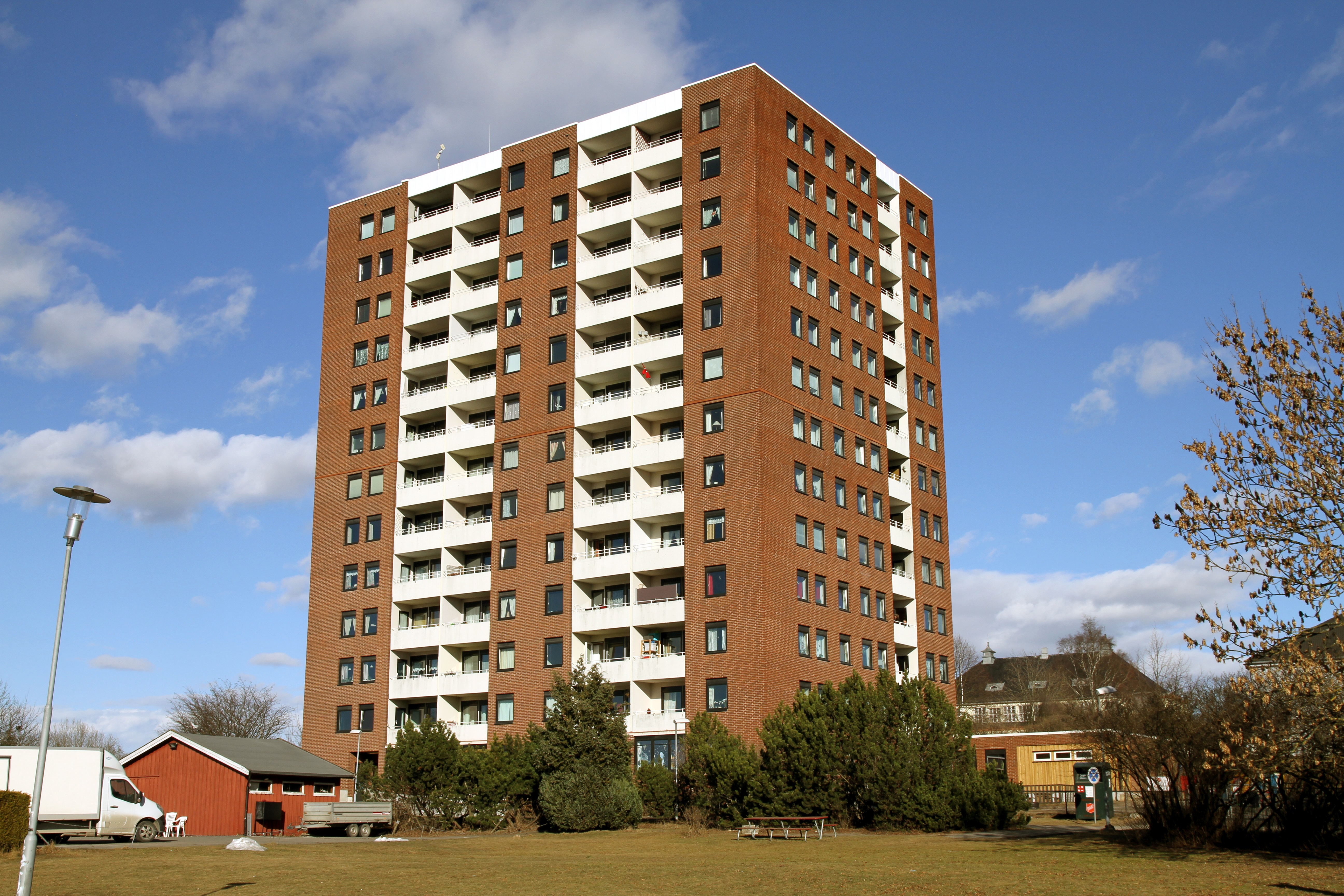 Regnbueveien 2c i Oslo.